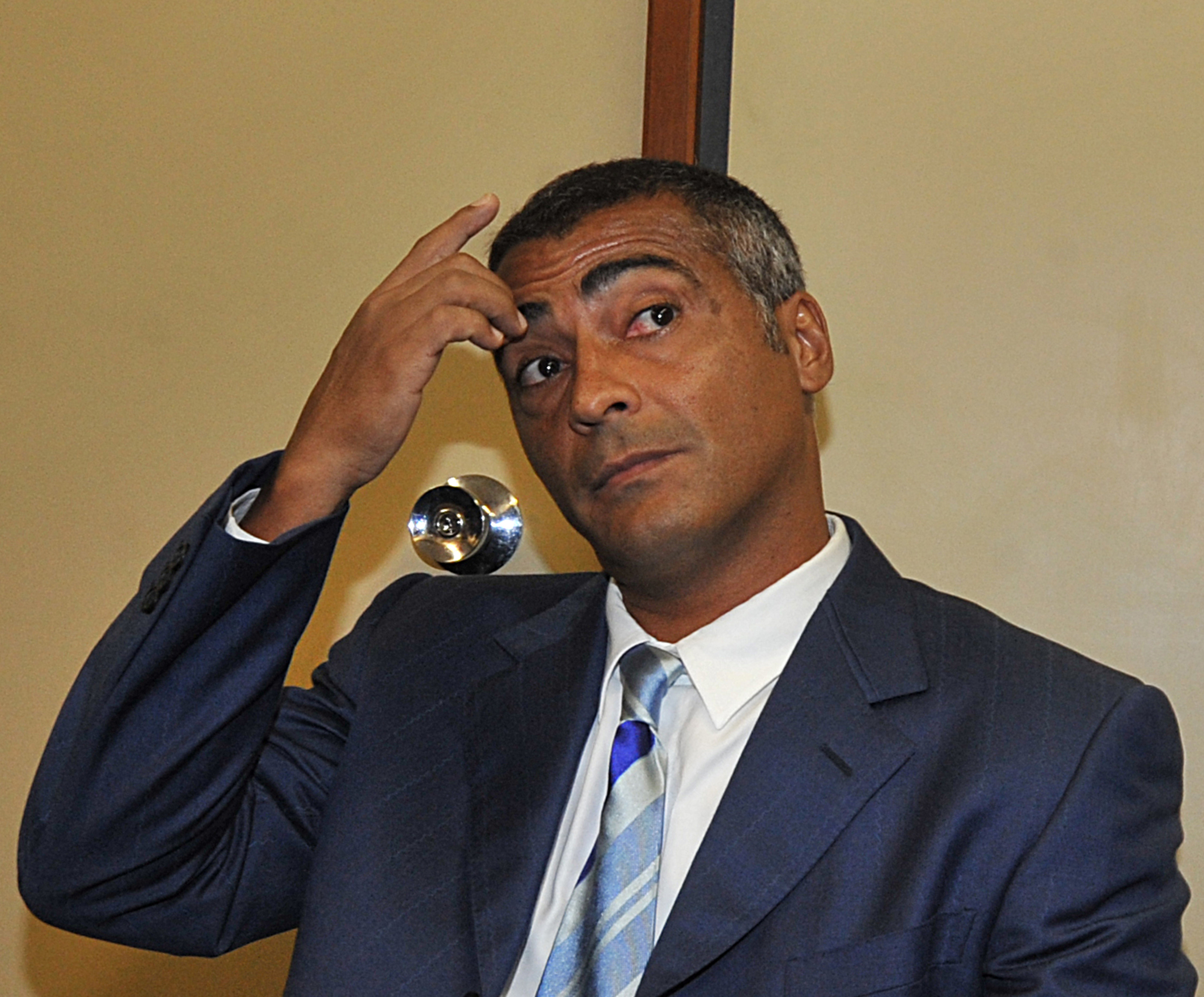 Brasília - O ex-jogador de futebol Romário visita a Câmara dos Deputados.